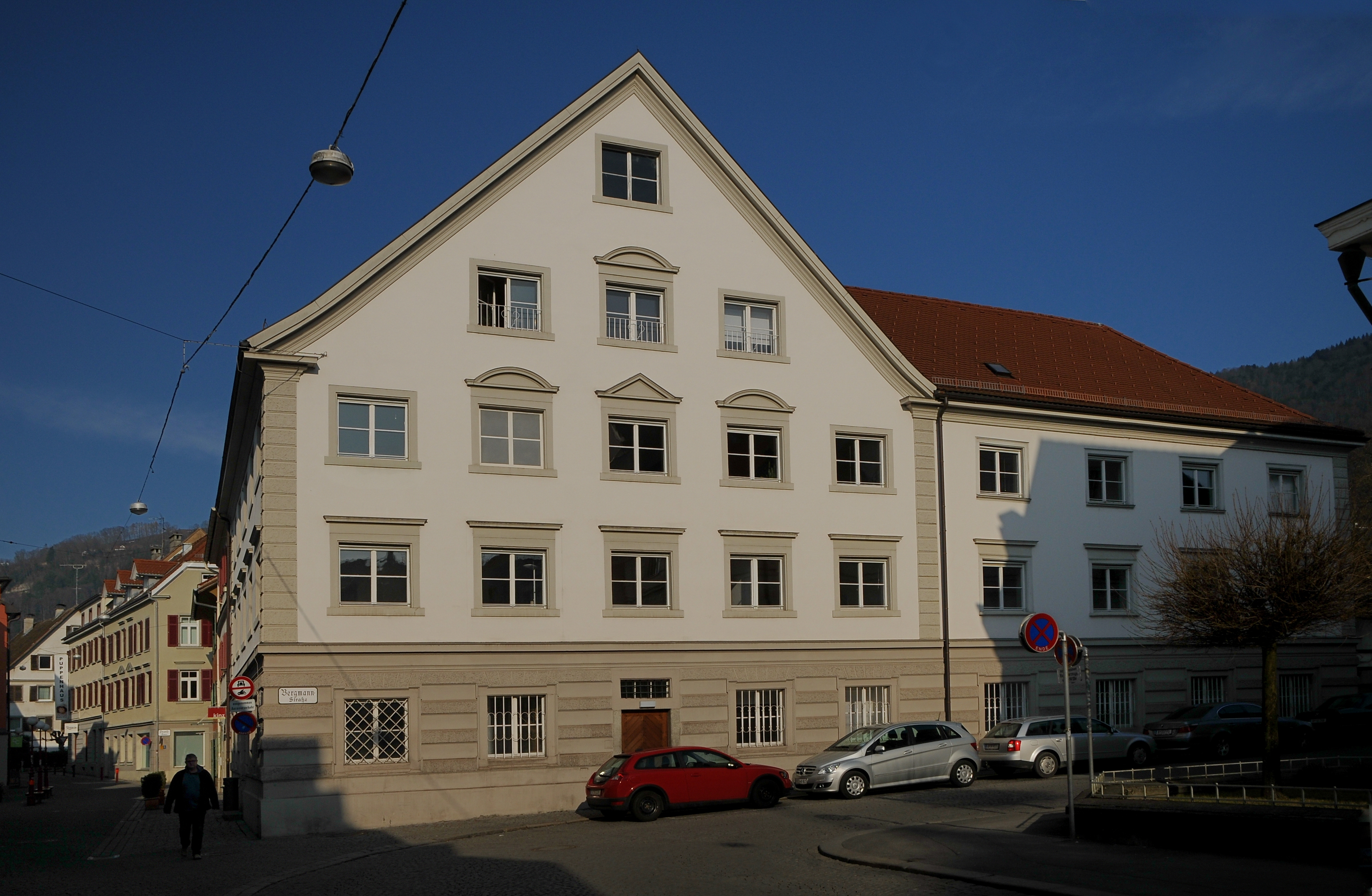 aus dem DEHIO Vorarlberg 1983: Bregenz, Anton-Schneider-Straße Nr.14 Bezirksgericht. Erbaut von Johann Georg Kuen (?), 1680. Eckhaus zur Bergmannstraße, durch den Freiplatz vor der Nationalbank in der Achse der Anton-Schneider-Straße frei sichtbare 3geschossige Giebelfront mit fünf Fensterachsen, Satteldach und Ortstein, Erdgeschoß gebändert und rustiziert; 3geschossiger Anbau zur Bergmannstraße, Erdgeschoß wie Hauptgebäude; gerade, Segmentbogen- und Dreieckgiebelverdachungen; in der Front der Anton-Schneider-Straße gefasstes Rundbogenportal aus Sandstein, bezeichnet 1680, zeitgenössische Türflügel mit Beschlägen.